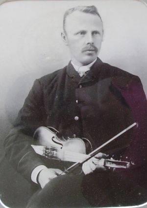 Gamalt foto av Nils Tjoflot. Fotograf frå Hardanger, ukjendt.